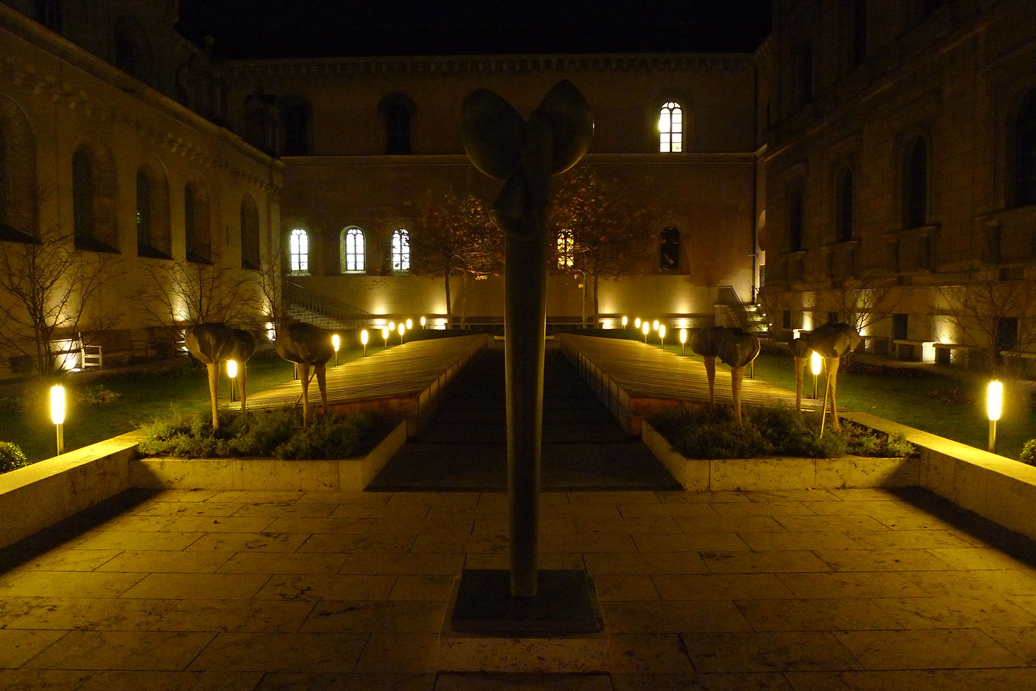 Kabinettsgarten Residenz München Nacht